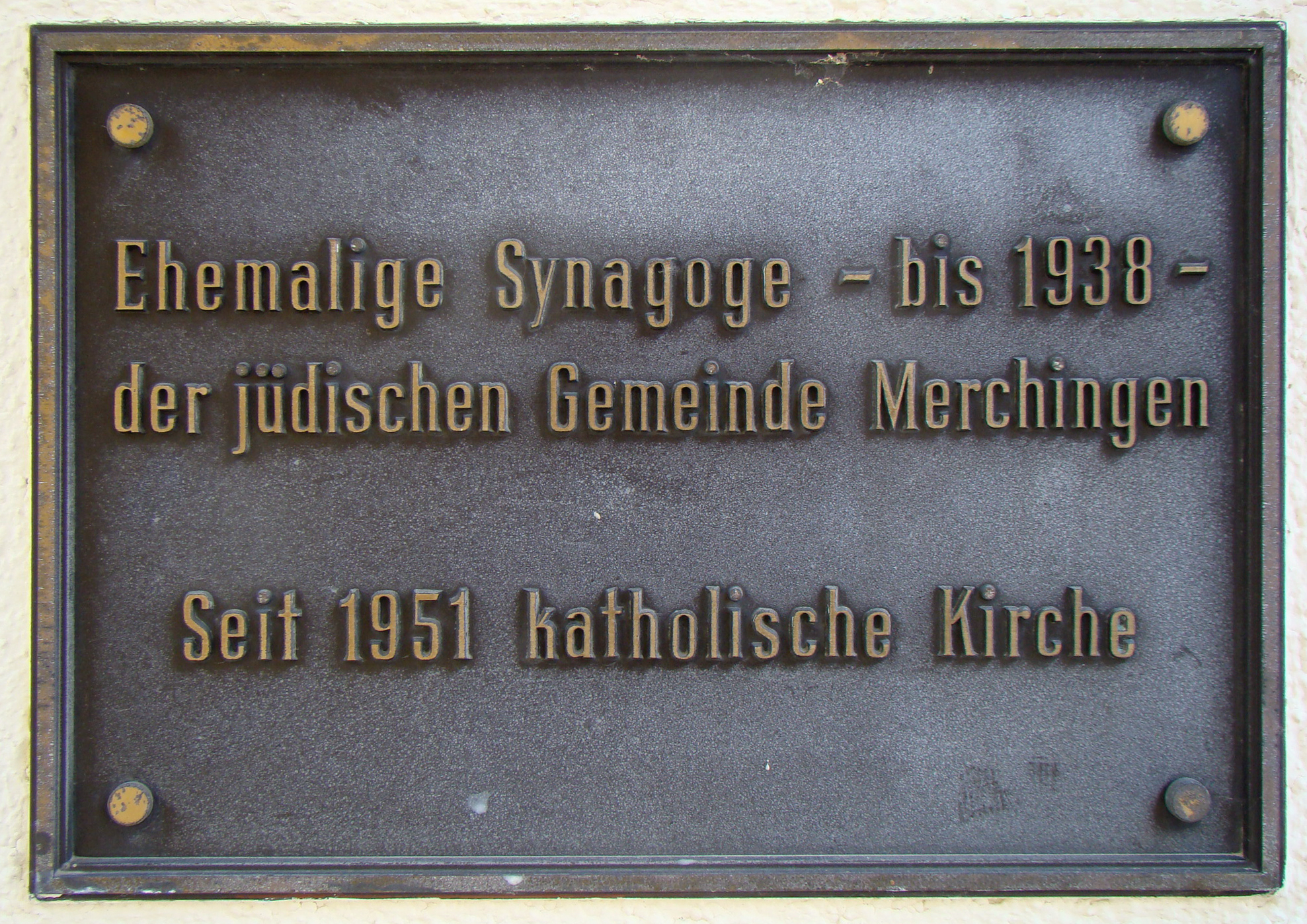 Herz-Jesu-Kirche in Merchingen, ehem. Synagoge der jüdischen Gemeinde